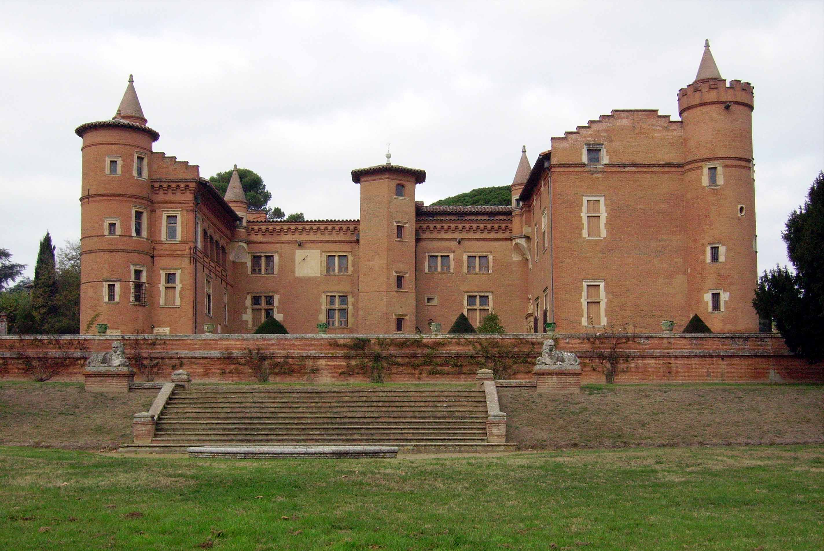 Château de Pibrac en Haute-Garonne (France)